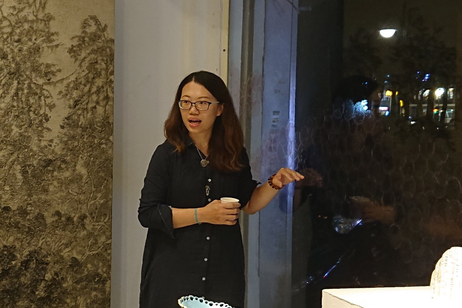 20190510 時空旅行 對話練習 特展座談會